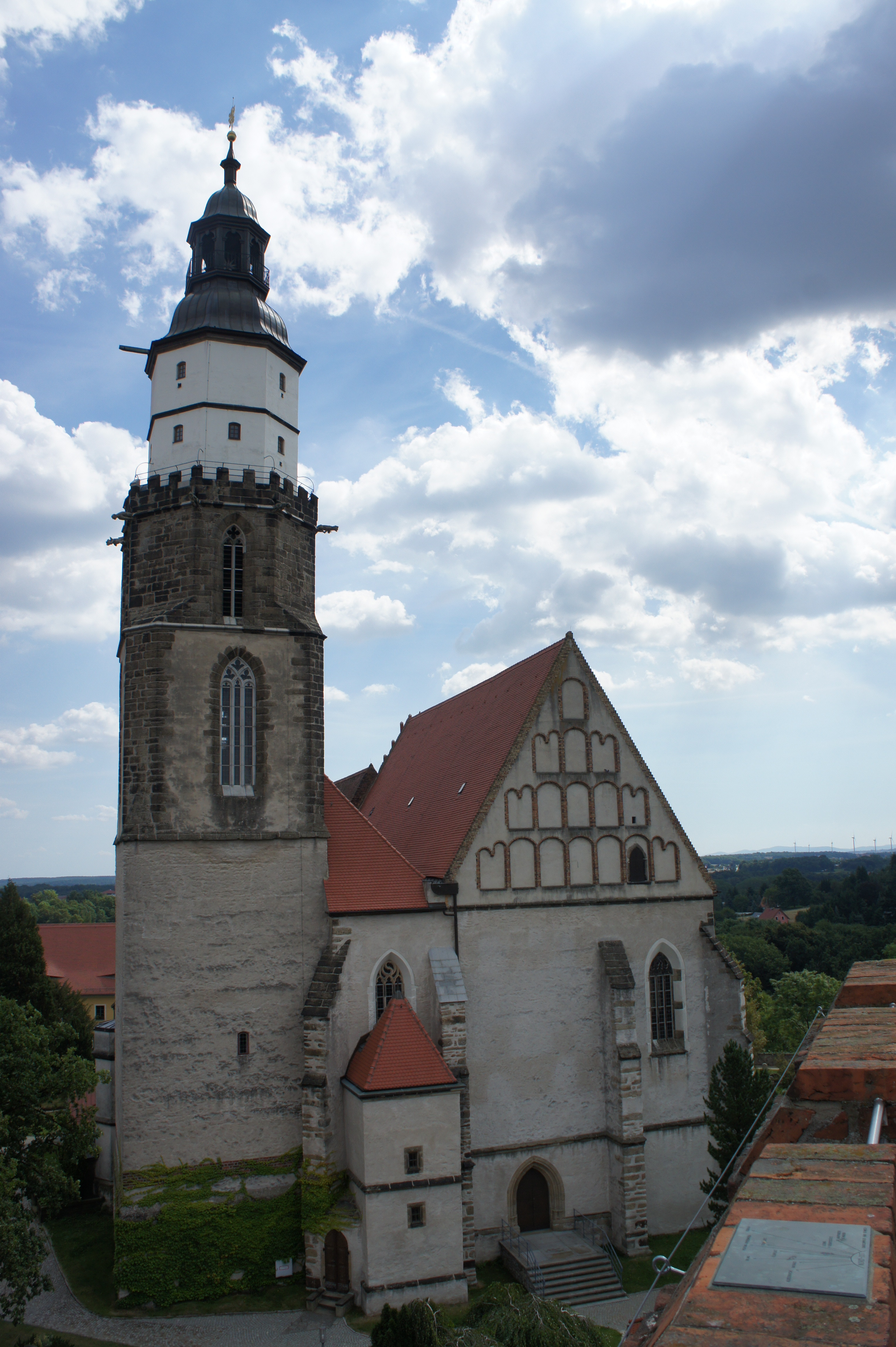 Kamenz Hauptkirche St. Marien, 1275-1479 errichtet, 63 m hoher Turm mit spätbarocker Haube, 1729 Taufort von G. E. Lessing